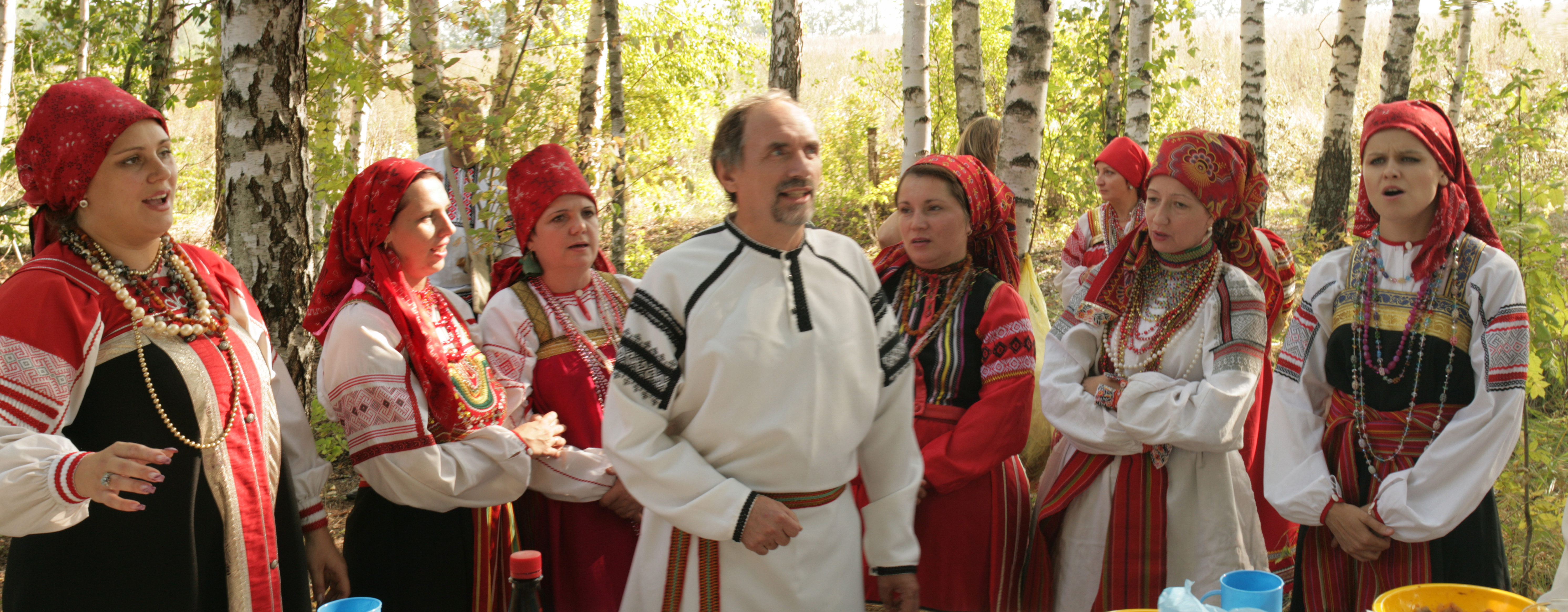 Ансамбль «Пересек». Открытие нового микрорайона родового экокопоселения «Кореньские родники». 15 сентября 2012 г. Белгородская область, Шебекинский район.